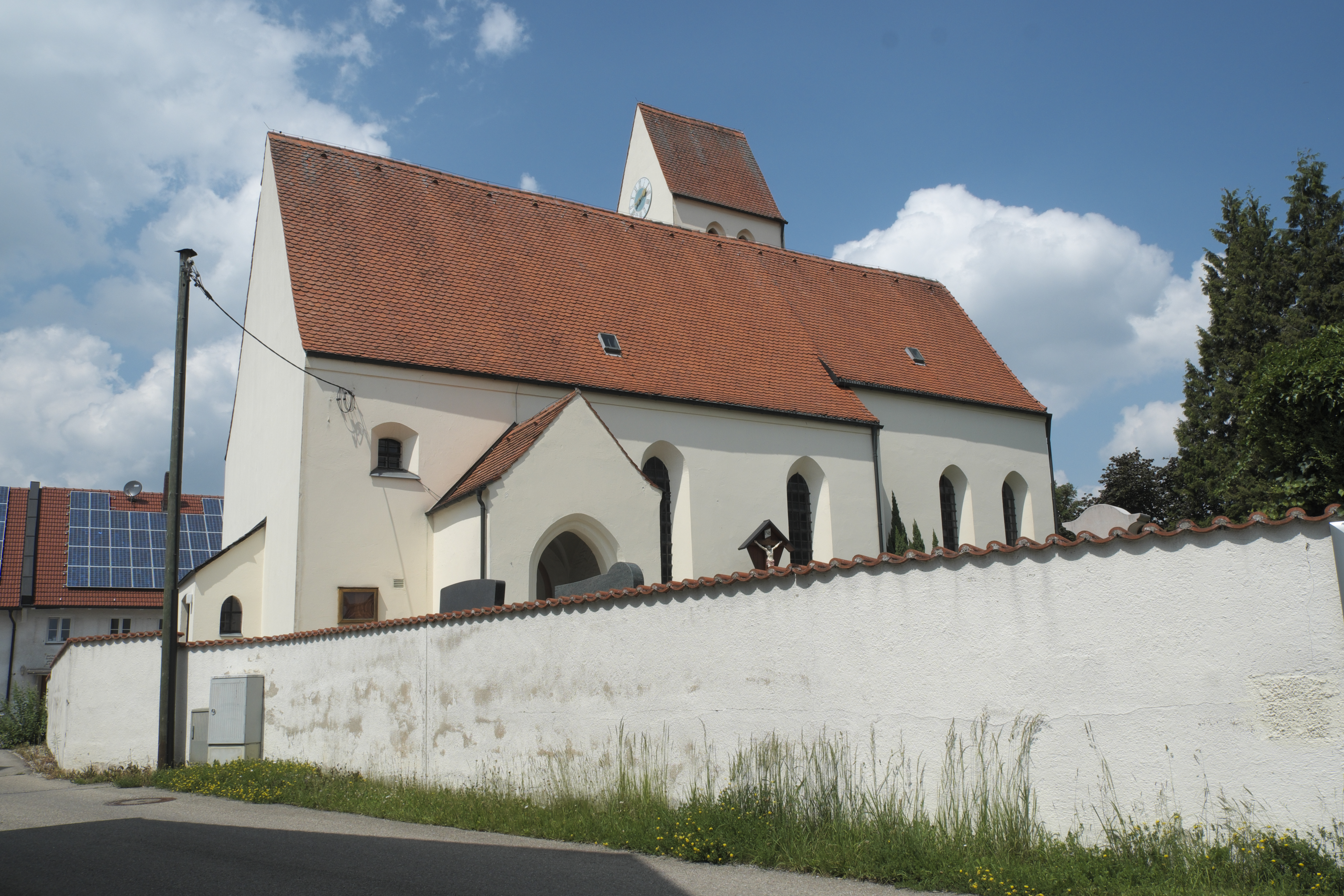 Katholische Filialkirche St. Peter und Paul in Holzkirchen (Alling) im Landkreis Fürstenfeldbruck (Bayern/Deutschland)